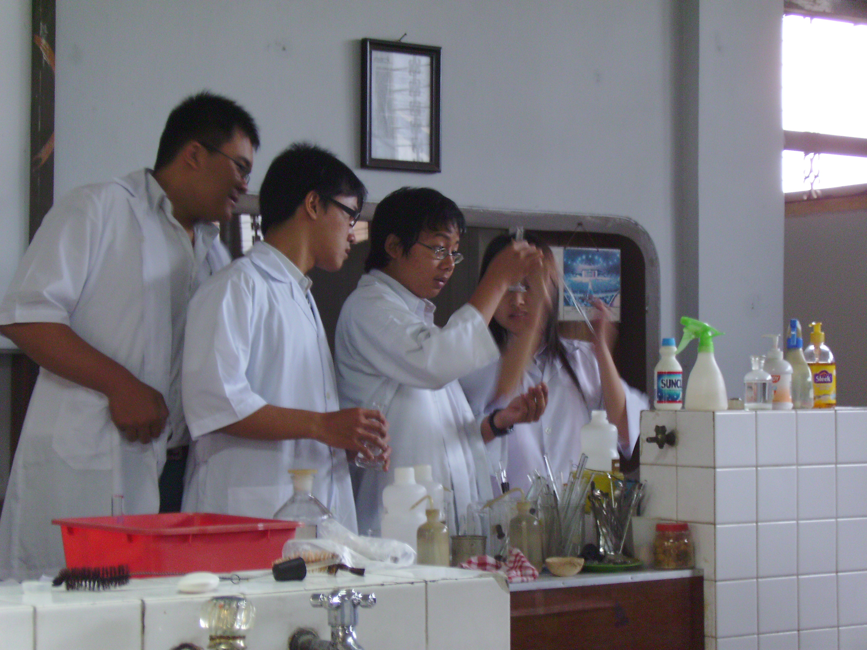 Praktikum Kimia di SMA Trinitas